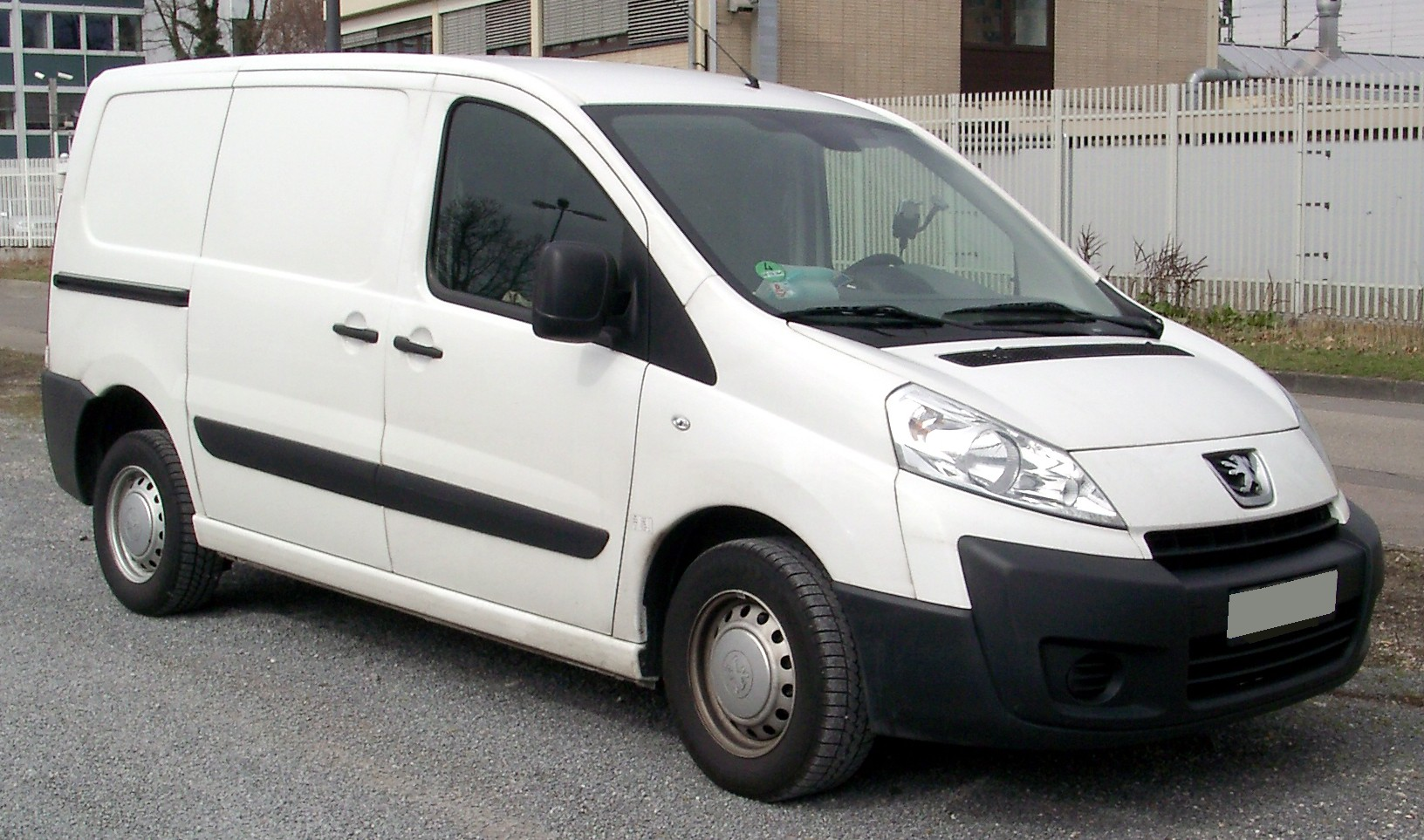 Peugeot Expert